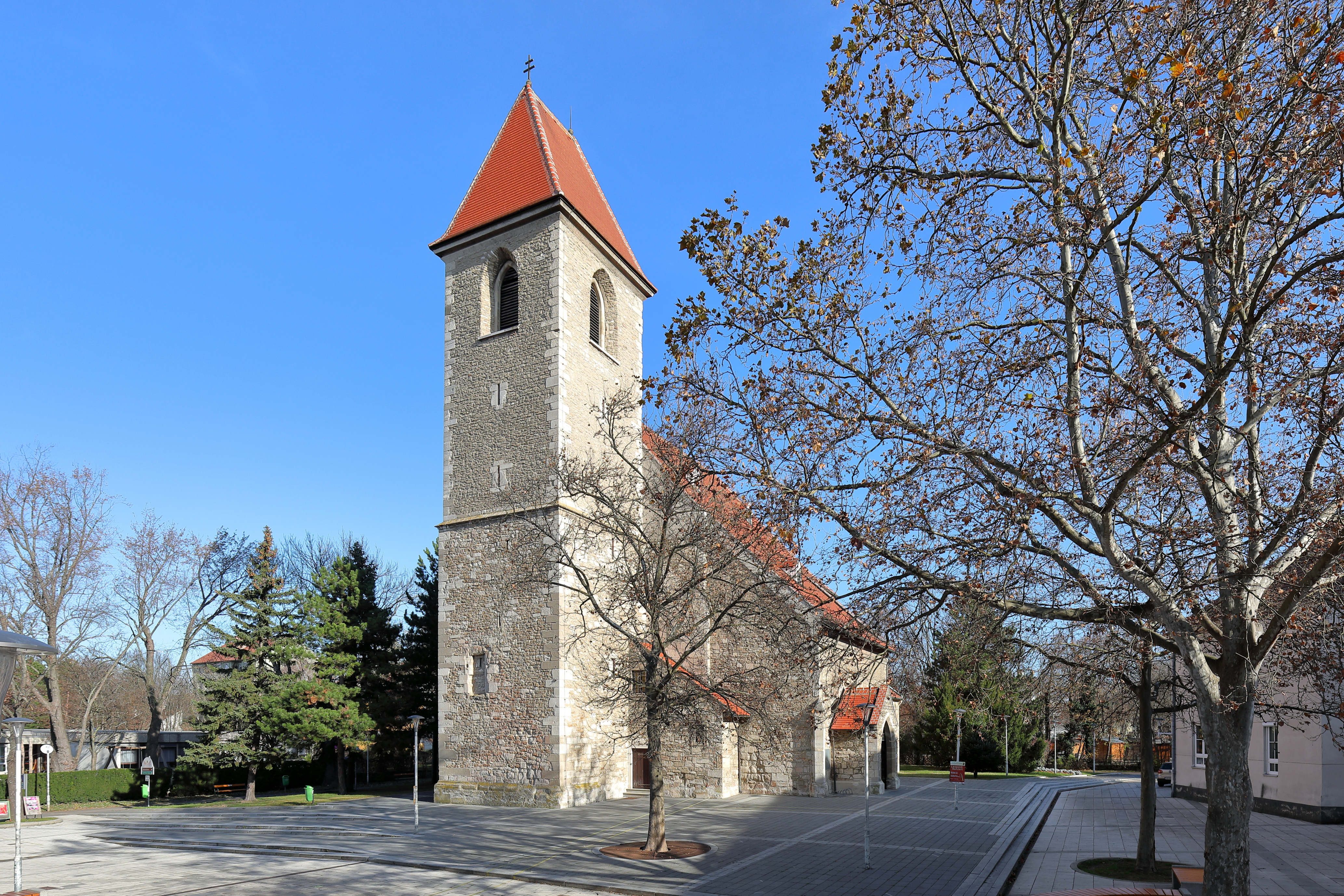 Südwestansicht der röm.-kath. Pfarrkirche hl. Georg in der niederösterreichischen Marktgemeinde Himberg.Eine um 1130 errichtete Kirche, die ursprünglich Teil einer im 16. Jahrhundert zerstörten Burganlage war. Um 1230 wurde südseitig eine Kapelle angebaut und um 1400 erweitert, wobei dabei wohl der Anbau des südlichen Seitenschiffes gemeint ist. Ungefähr Mitte des 13. Jahrhunderts erfolgte die Errichtung des frühgotischen Chores und in der 1. Hälfte des 15. Jahrhunderts der Ausbau des markant vorgestellten Westturmes. Nachdem die Kirche bei der Zweiten Wiener Türkenbelagerung beschädigt wurde, erfolgte im Zuge der Instandsetzung eine Erhöhung und Einwölbung des Langhauses. Die Sakristei ist im barocken Stil und wurde in der Mitte das 18. Jahrhunderts nordseitig angebaut. Im Zuge des II. Weltkrieges wurde die Kirche schwer beschädigt und 1951/52 wieder aufgebaut.